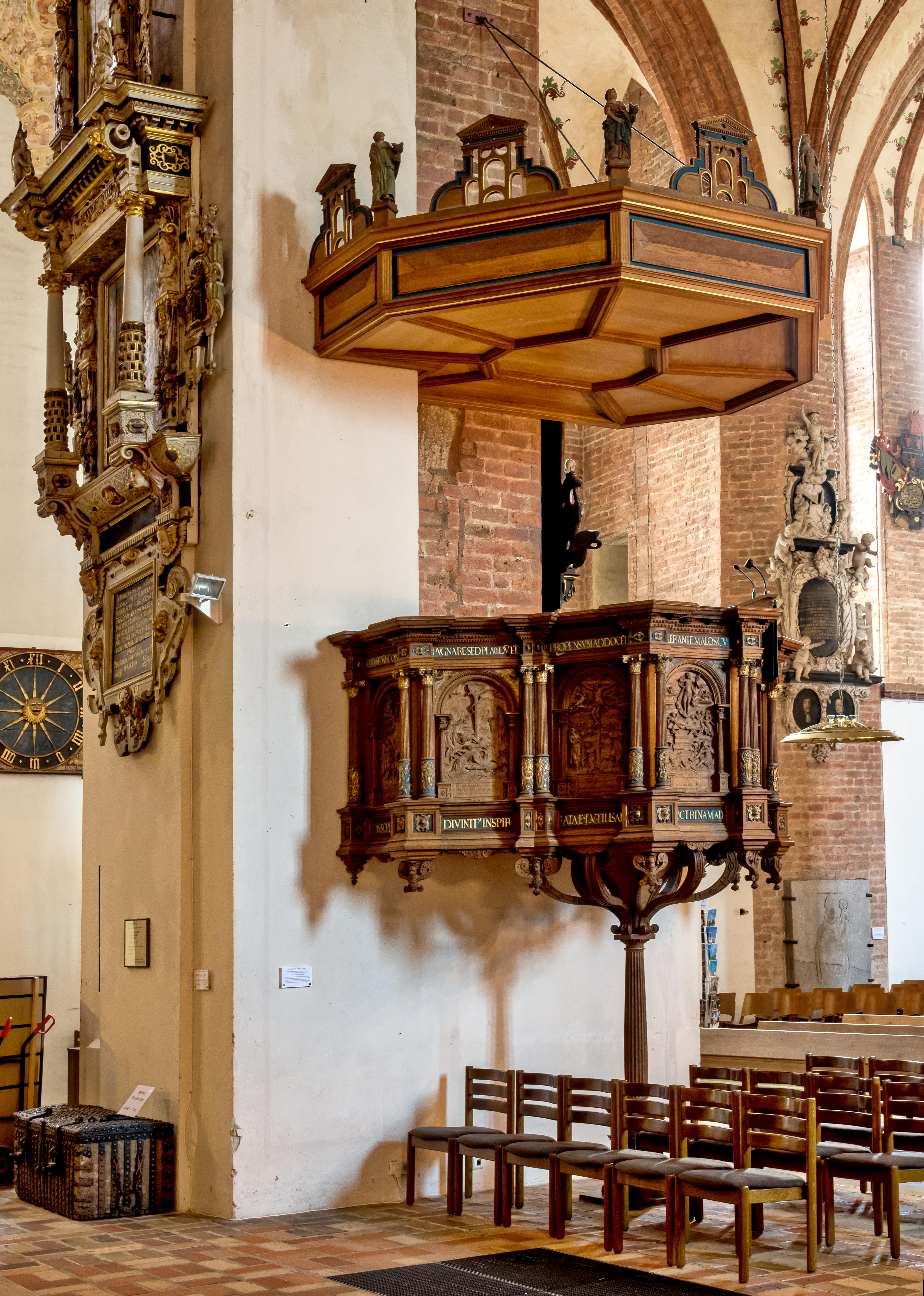 Bilder aus Schleswig Bilder aus dem Inneren Bilder vom Dom St. Petri in Schleswig